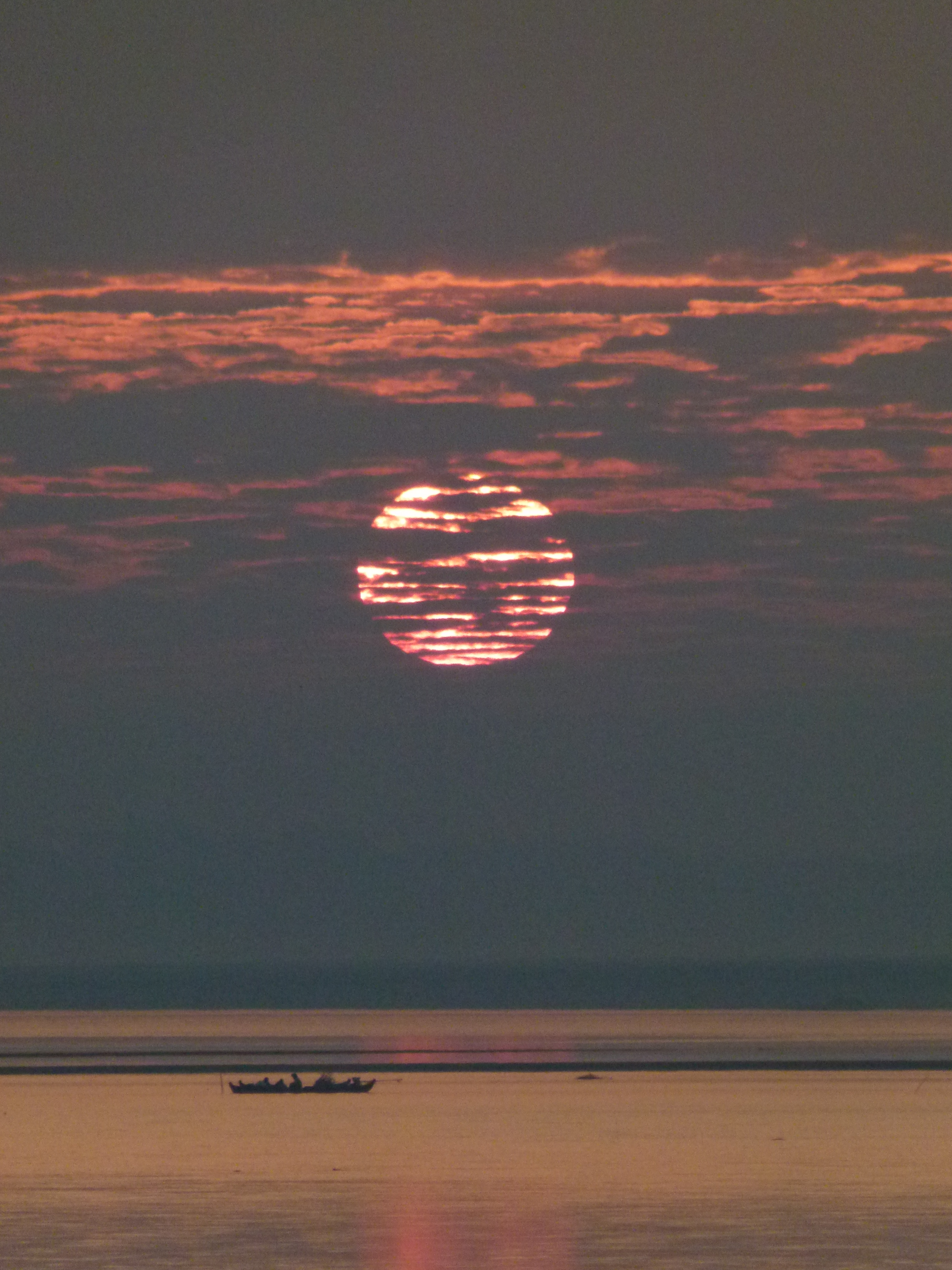 entre Bagan et Mandalay